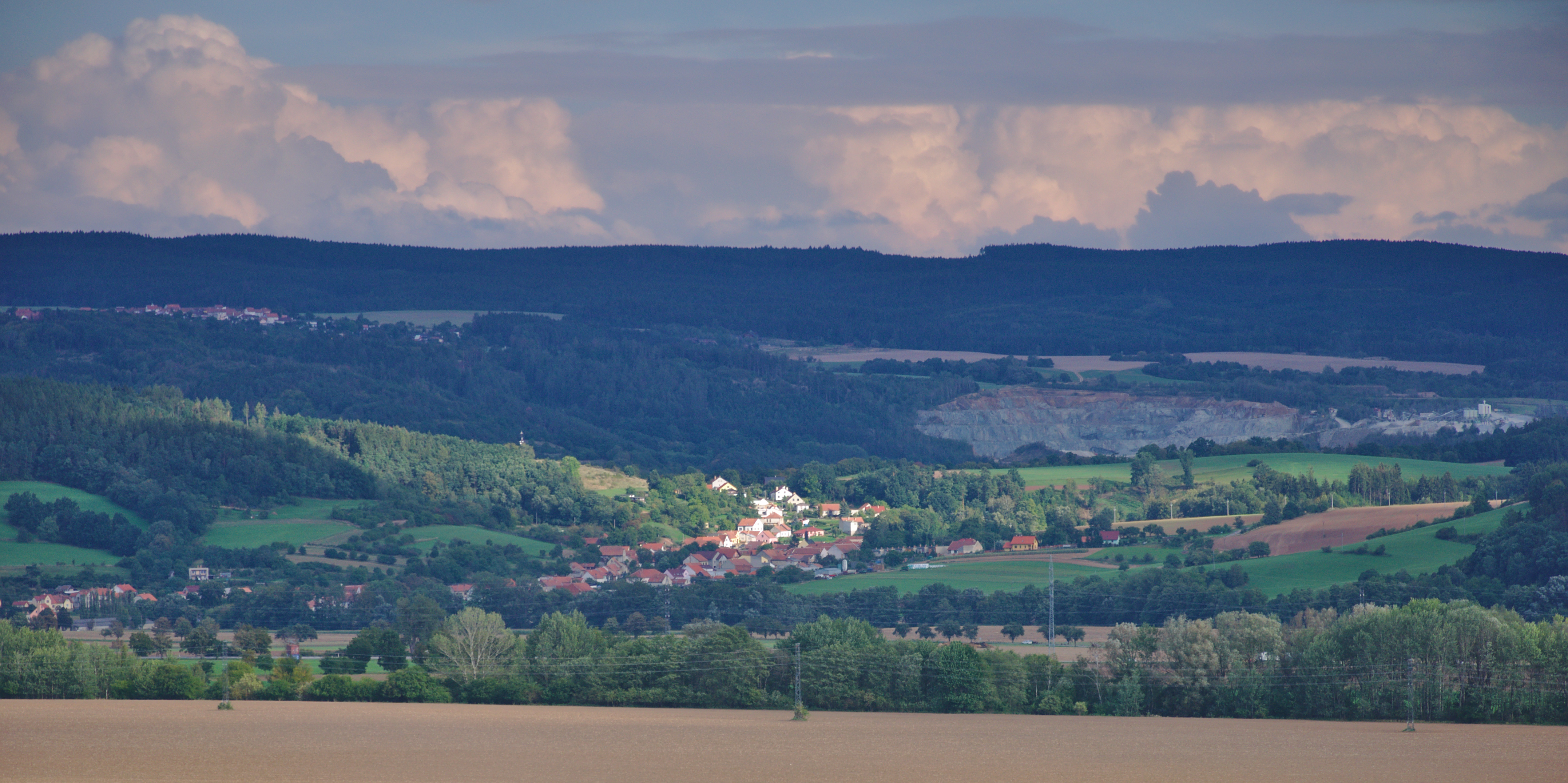 Pohled na obec od severozápadu, Jabloňany, okres Blansko